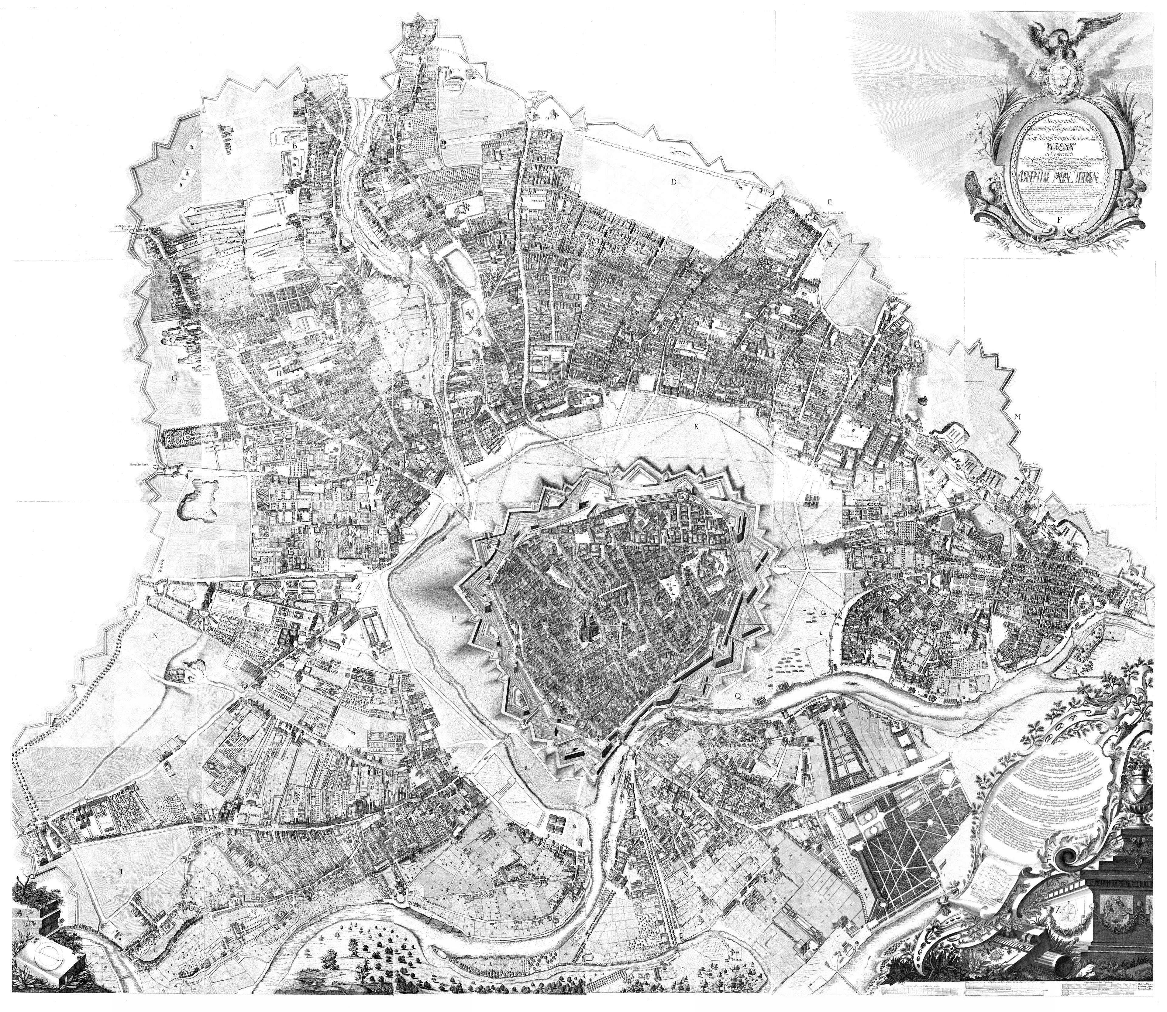 Perspektivdarstellung von Wien und den Vorstädten bis zum Linienwall. 1769-1773 (gedruckt 1778). Kupferstich auf 24 Blättern, Maßstab 1 : 1440, Ausrichtung nach Westsüdwest. Befestigungsanlagen absichtlich nicht wirklichkeitsgetreu. Original mit Konskriptionsnummern